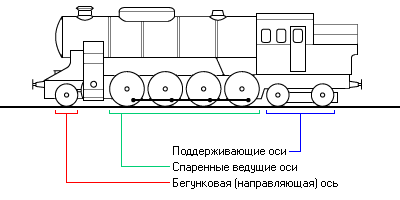 Схема, иллюстрирующая предназначение разных осей паровоза Схема, поясняющая назначение разных осей паровоза